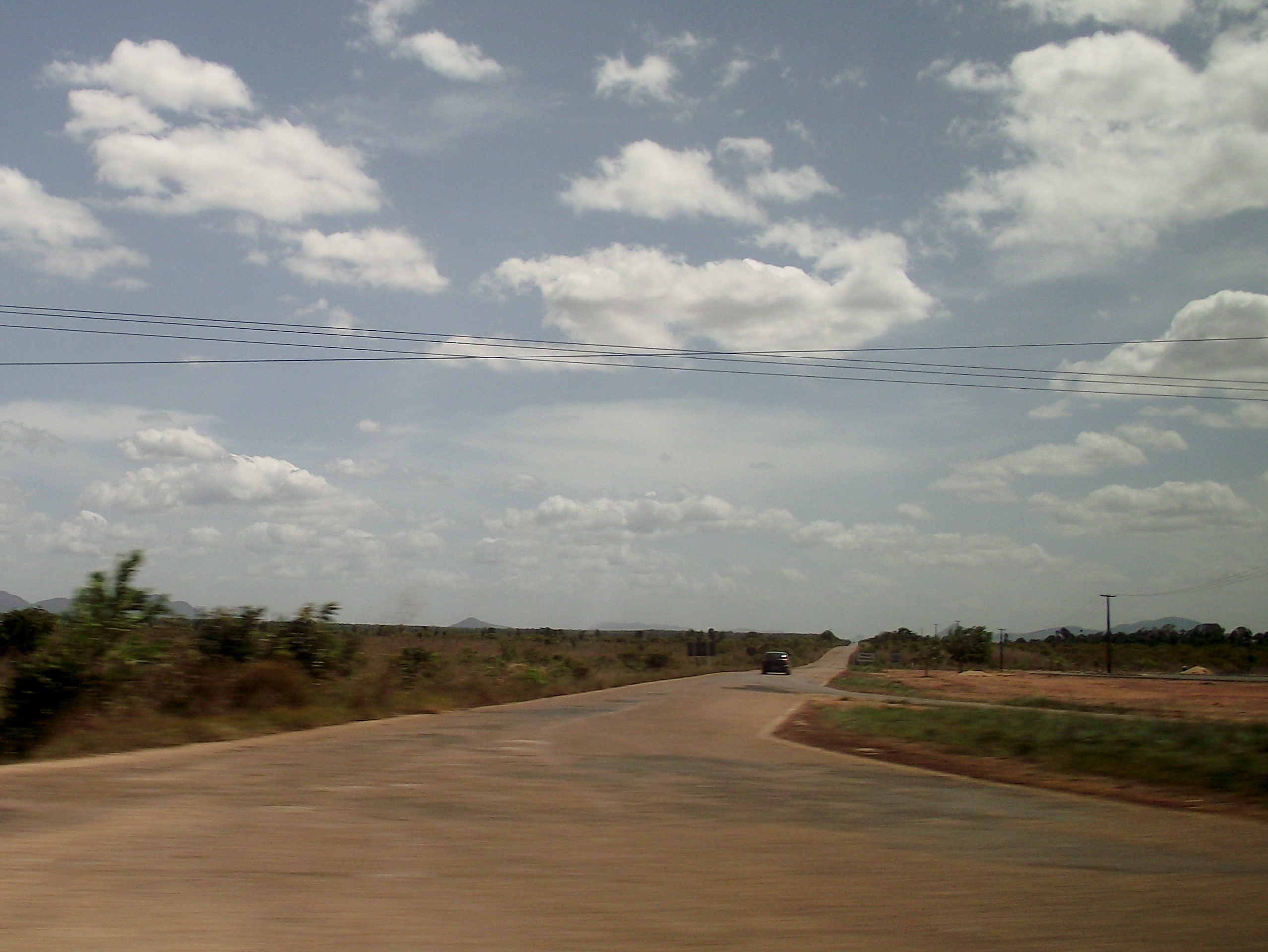 BR-432 (km 0), Roraima, Brasil.